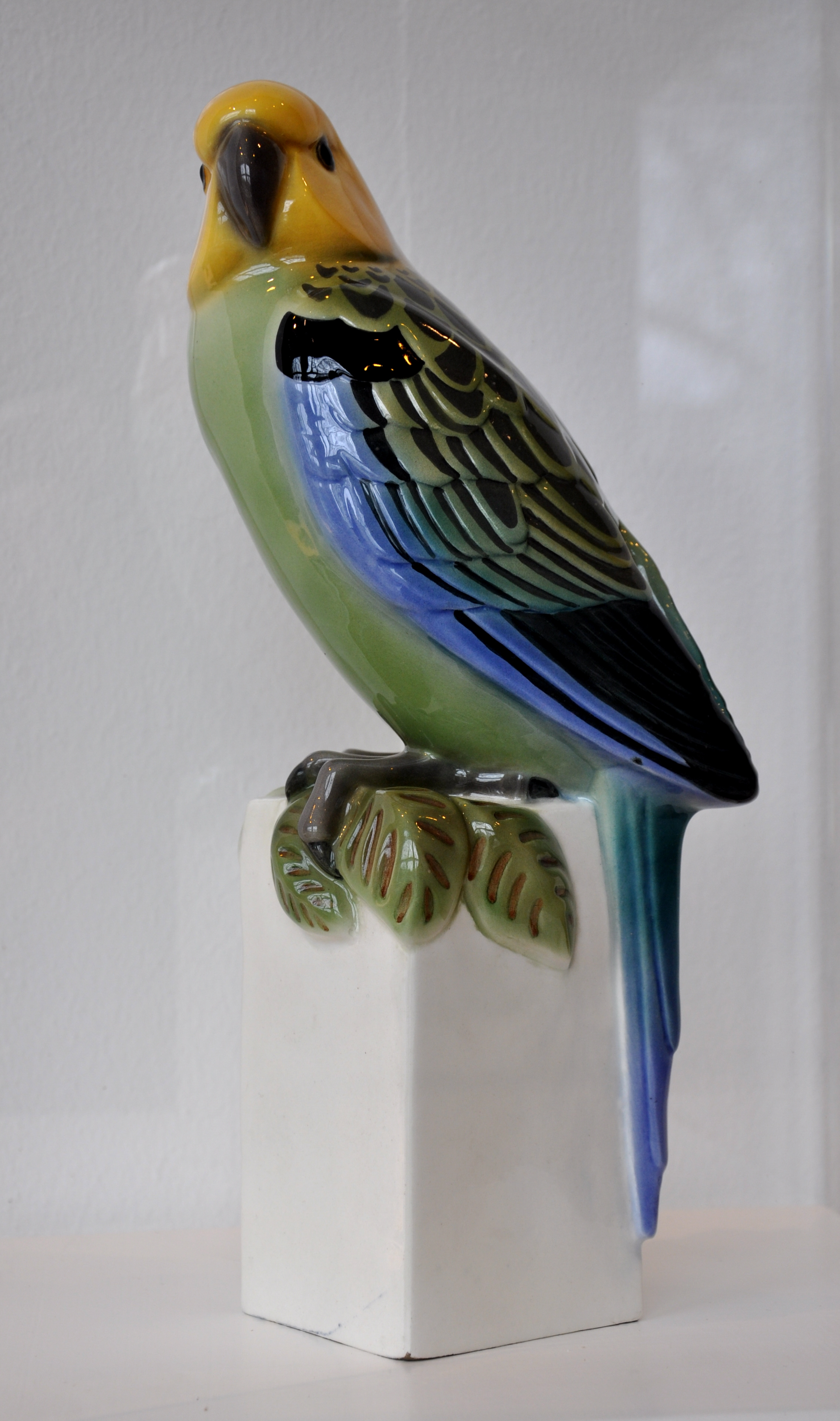 Papagei auf eckigem Sockel, Steingut, glasiert, bemalt, Manufaktur Goldscheider, Wien, 1910–1918 Museum für Angewandte Kunst, Frankfurt am Main, Inv. Nr. 5569 (Schenkung Dr. Hermann von Trenkwald)